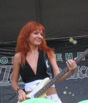 София Тайх на концерте группы «Лицей».